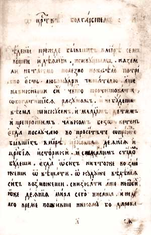 A page from the book "Slavonic-Bulgarian History". (1762) Страница от книгата "История славяноболгарская" (1762)